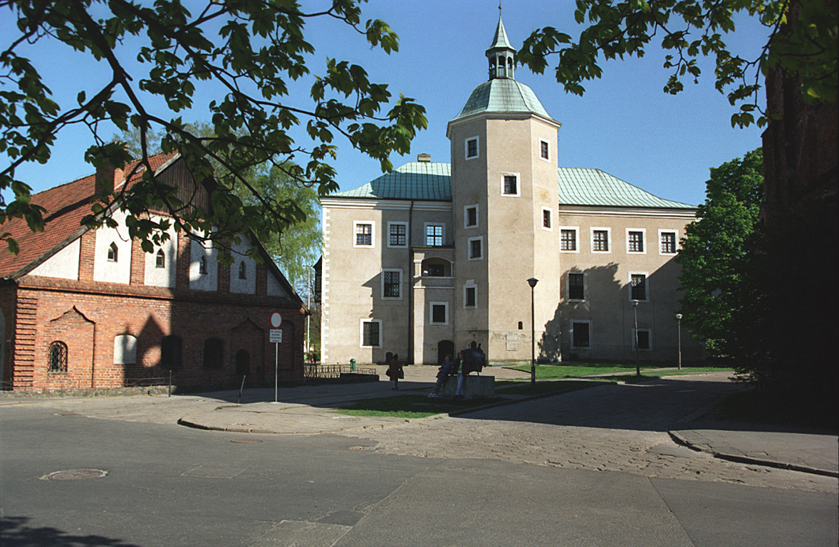 Słupsk